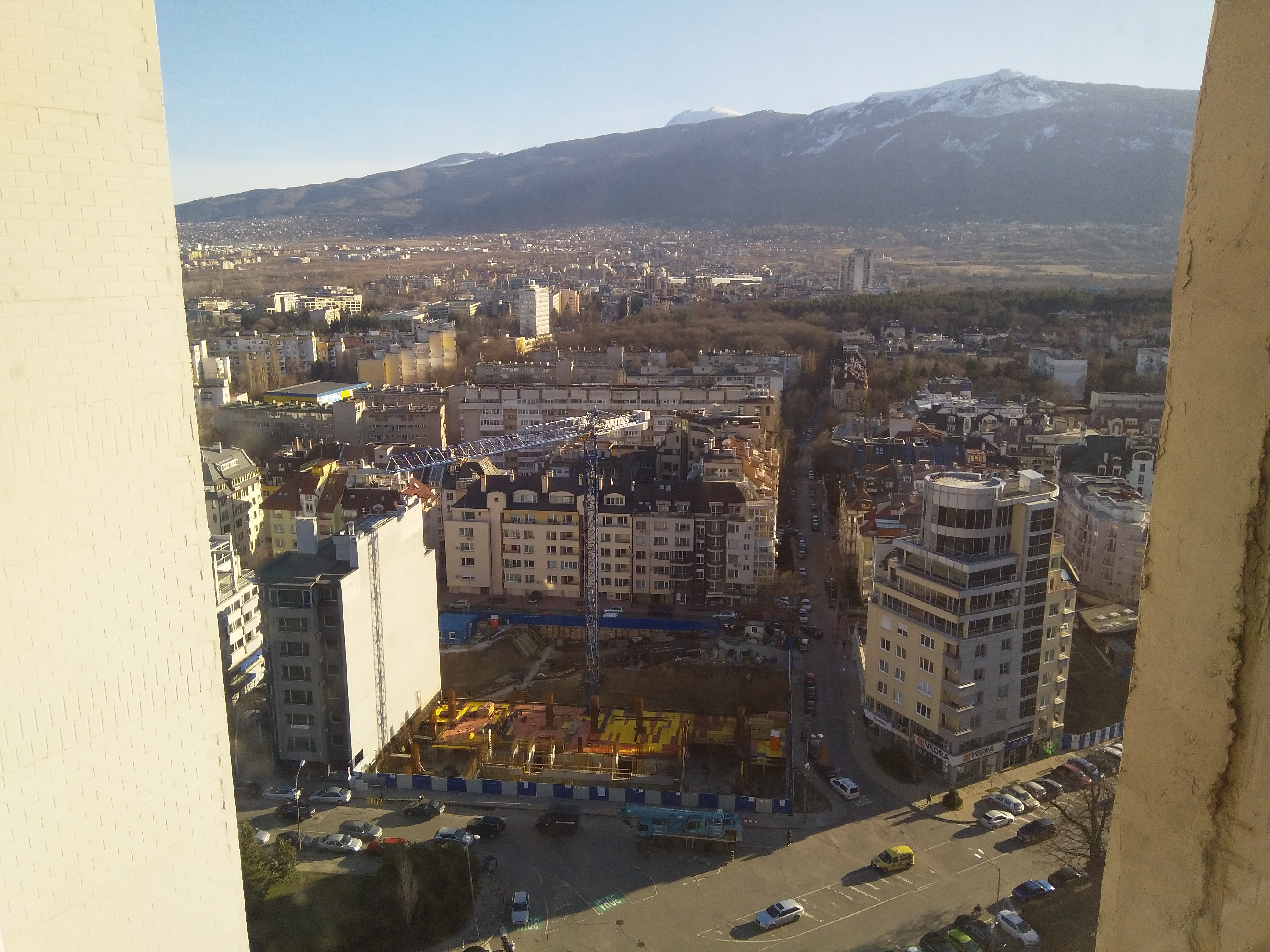 Поставяне на арматури и изливане на бетон за изграждане на партера през 2018 г.